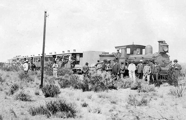 La locomotora N° 3 con tren cargado de pasajeros en Torre José en la cima de la pendiente desde Puerto Madryn. Era capitulado como picnic de escuela dominical, pero hay otras fotografías con otras máquinas en el mismo lugar. Así que es posible que haya sido un sitio habitual para hacer picnic.